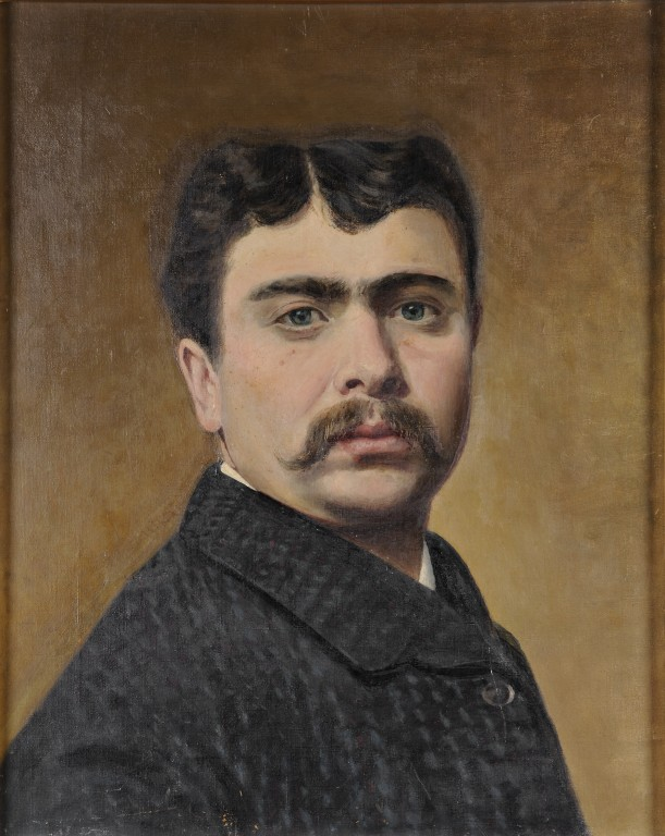 Autoritratto, olio su tela, 40 x 50 cm., Centro culturale “Carlo Venturini", Massa Lombarda